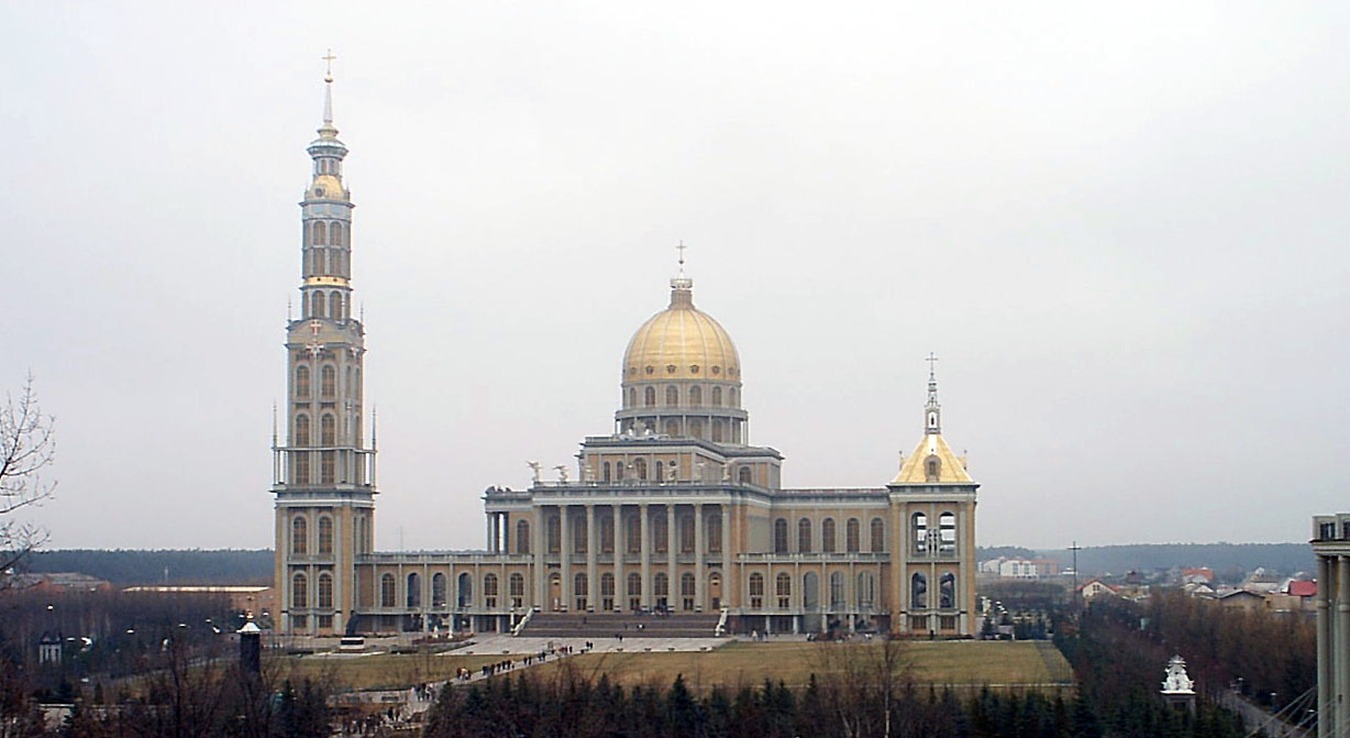 Außenansicht der Basilika von Lichen, Polen